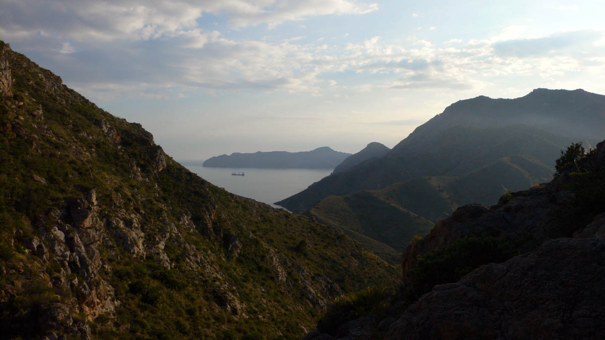 Vista del Cabo Tiñoso y la Sierra de la Muela en Cartagena (España)